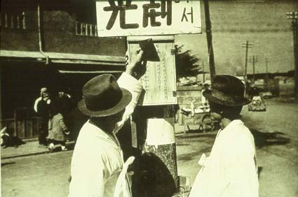 1948년 10월 전남 광주, 반민족행위특별조사위원회 전라남도 조사부에 설치한 투서함에 투서하는 모습. 국회는 1948년 9월 7일, 전문 3장 32조로 된 반민법을 통과시키고, 정부가 9월 22일 공포하였다. 1949년 1월 8일 반민족행위자 박흥식을 제1호 체포한 반민특위의 활동이 본격적으로 시작되었다. 2월 22일 노덕술을 구속하였다. 5월 20일 반민족행위자 처단 사업을 추진하던 이석원 의원등 세 명이 보안법 위반 혐의로 구속되었다. 반민법 시행을 반대하던 세력은 5월 31일 파고다 공원에서 '민중대회'라는 무허가 집회를 열고 구속의원의 석방결의안에 찬성한 88명의 국회의원을 공산당이라고 몰아붙였다. 6월 4일에는 서울시 경찰국 사찰과장과 종로서 사찰과 주임을 반민족행위자 피의자로 체포하였다.